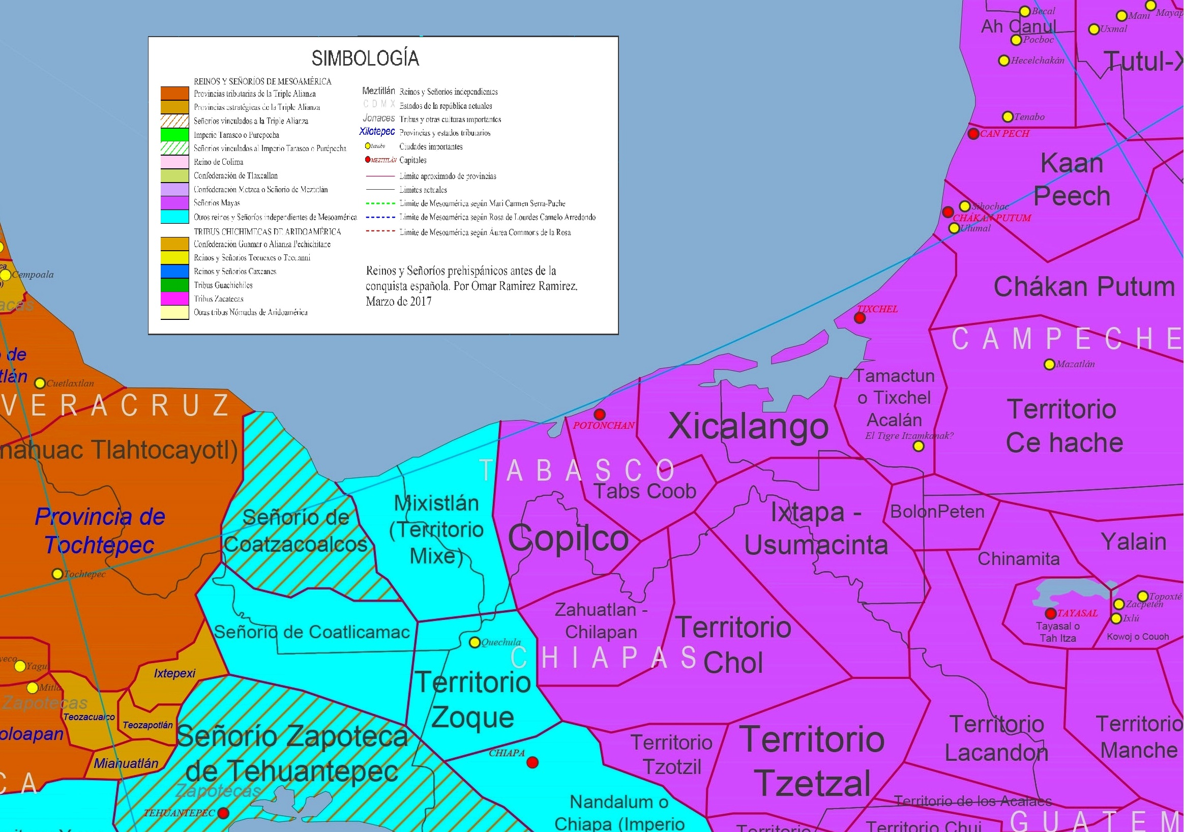 Modelo